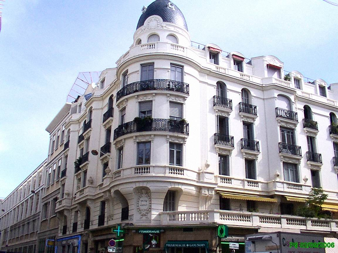 Photographies concernant la ville de Nice Palais Sapho - Quartier des Musiciens - Nice Vue générale angle clemenceau et Gounot Prise de vue nord-est, vers 11h